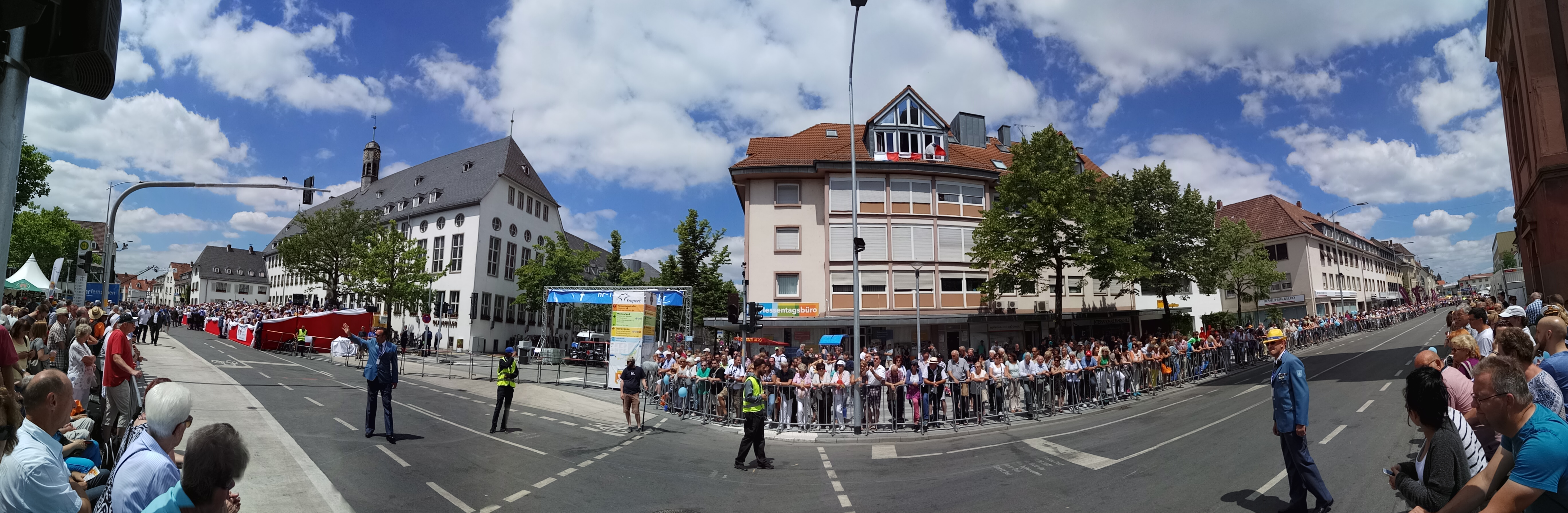 Der Marktplatz in Rüsselsheim am Main während des Hessentagsumzugs 2017